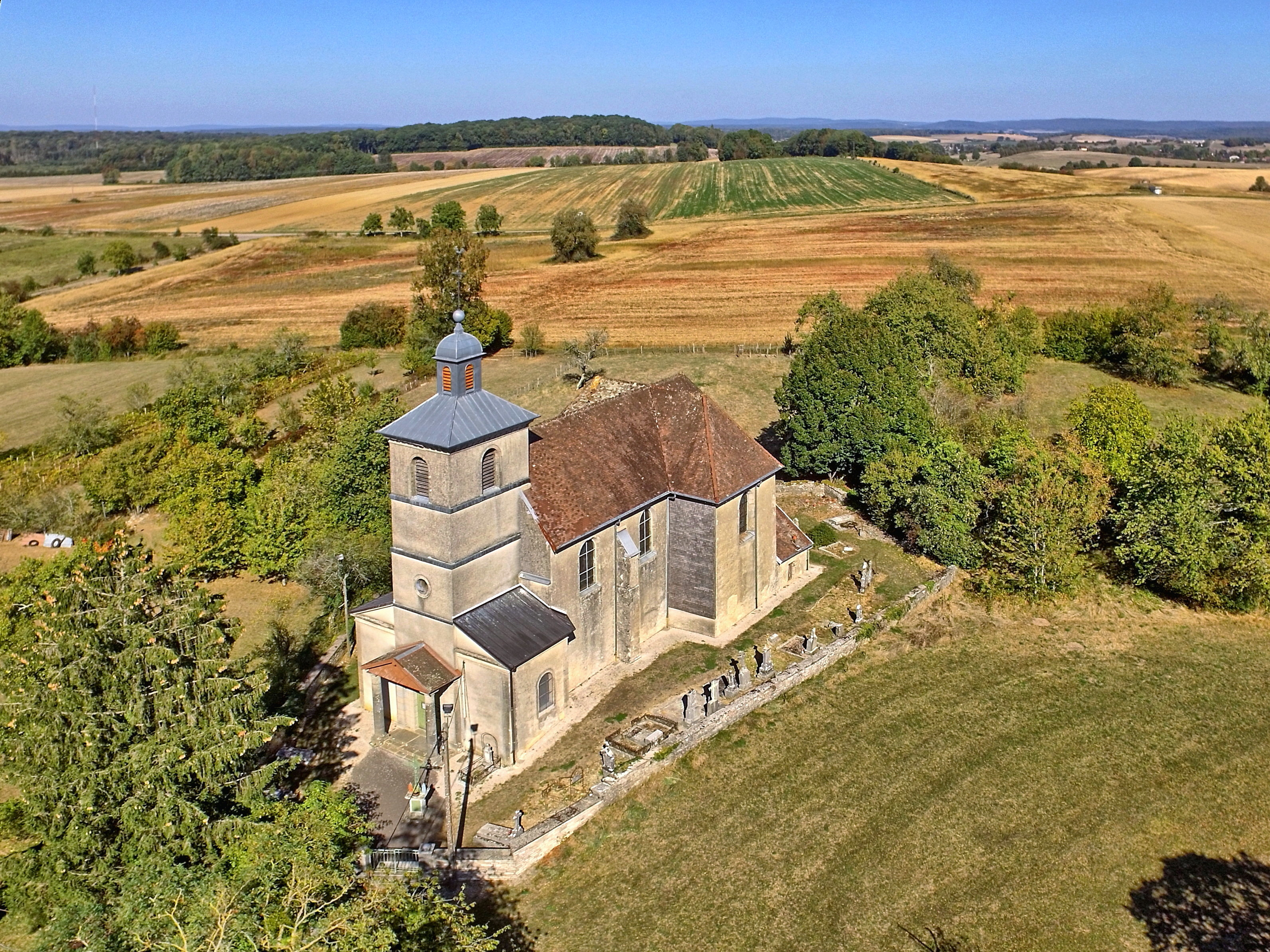 L'église de la Nativité-de-Notre-Dame .